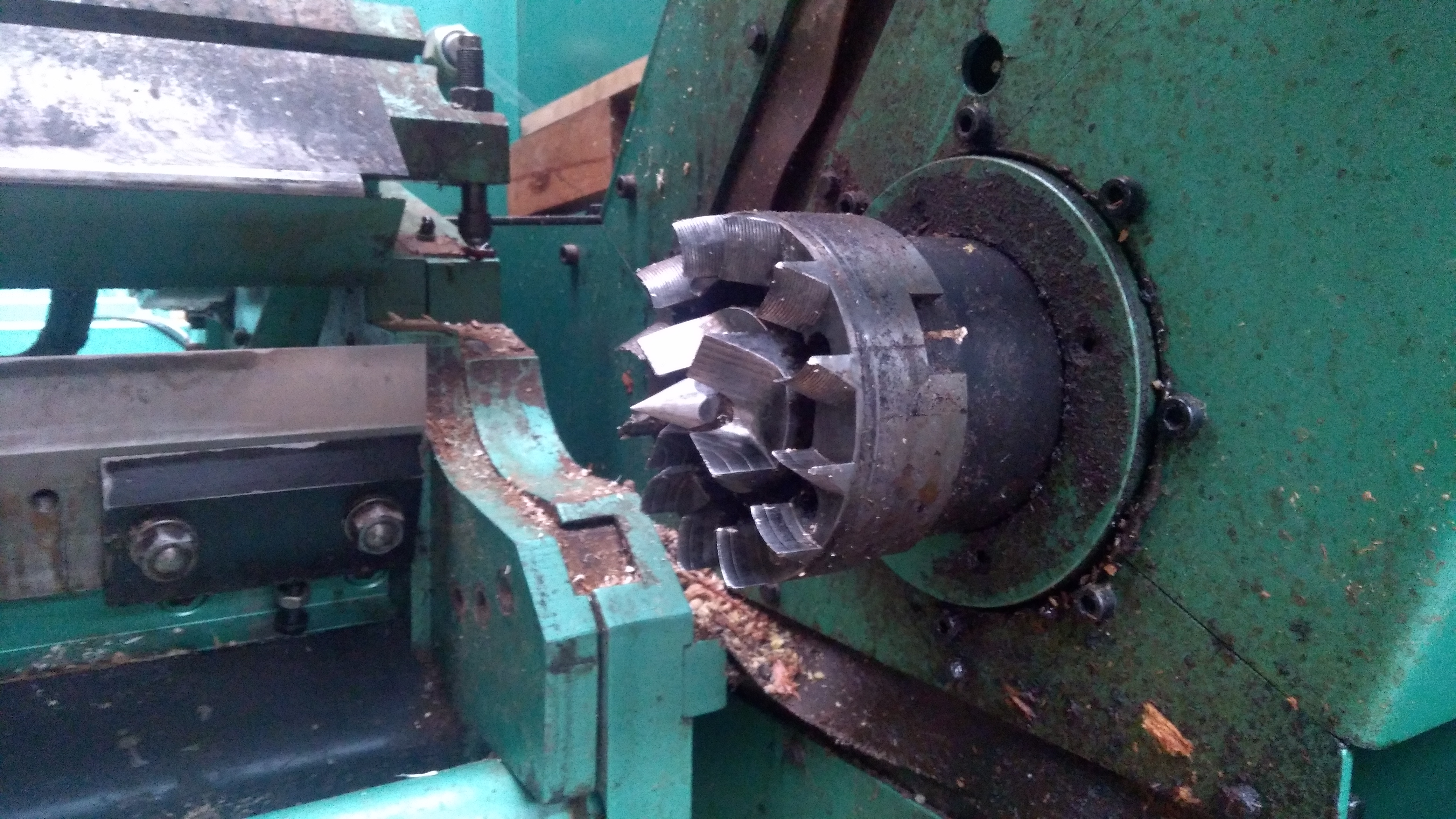 Ces mors servent à entraîner le billon en rotation pour permettre son déroulage. En fin de déroulage, il reste un cylindre de bois de la taille des mors.